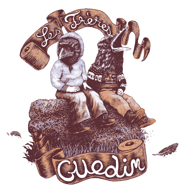 enfants corbeaux assis sur une pierre